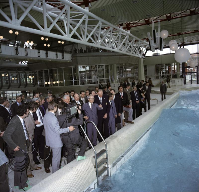 ADN-ZB / Reiche / 20.3.81 Berlin: Freizeitzentrum Das neue Sport - und Erholungszentrum Berlin ist am 20.3.81 eröffnet worden. Es wurde vom Generalsekretär des ZK der SED und Vorsitzenden des Staatsrates der DDR, Erich Honecker, seiner Bestimmung als Haus sinnvoller Freizeitgestaltung übergeben. Hier beim Rundgang in der Schwimmhalle- das Wellenbad-. Rechts neben E. Honecker Prof. Dr. Ehrhardt Giss Hinter E. Honecker: Günter Mittag (l.) und Wolfgang Junker (r.).